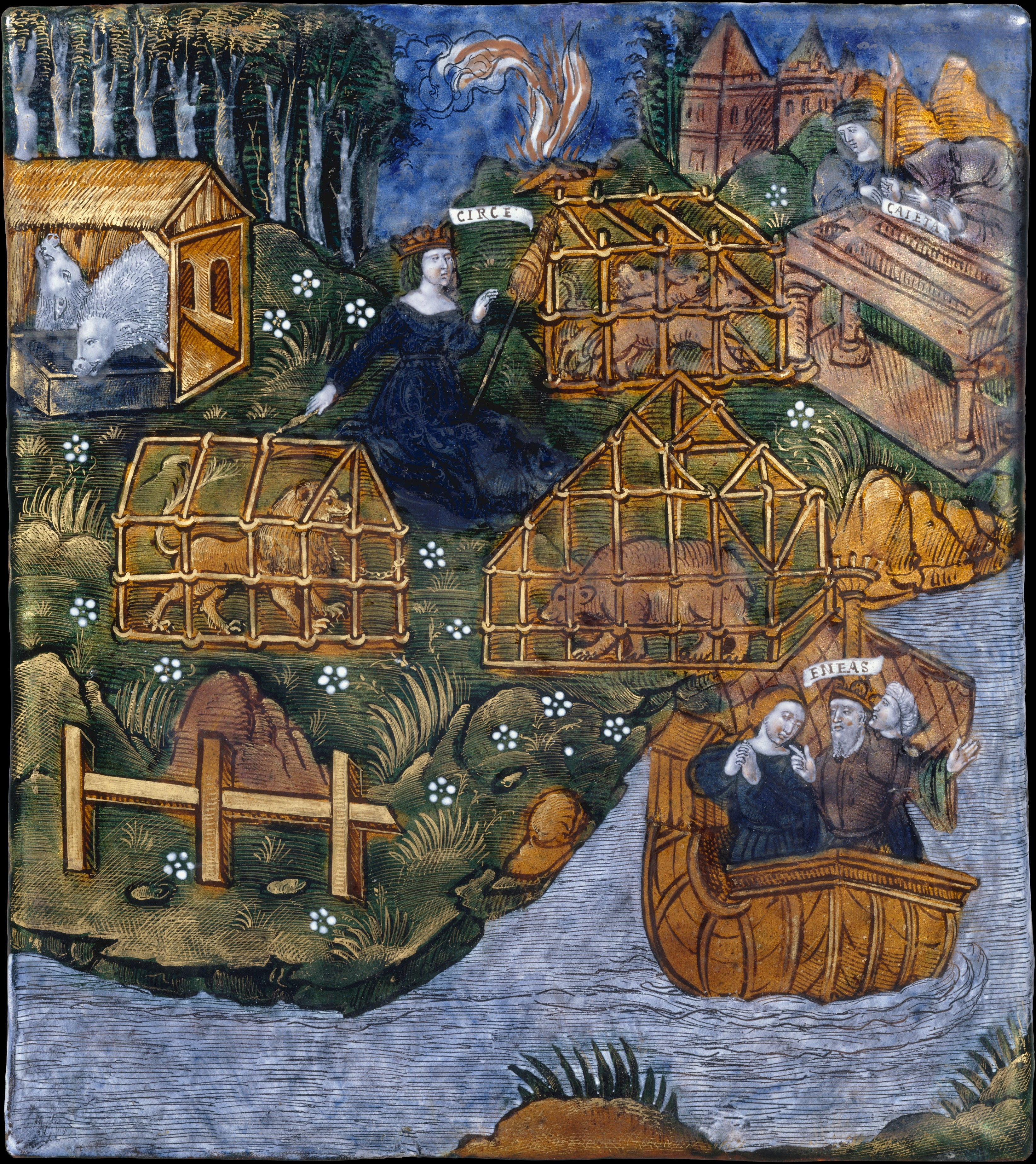 French, Limoges; Plaque; Enamels